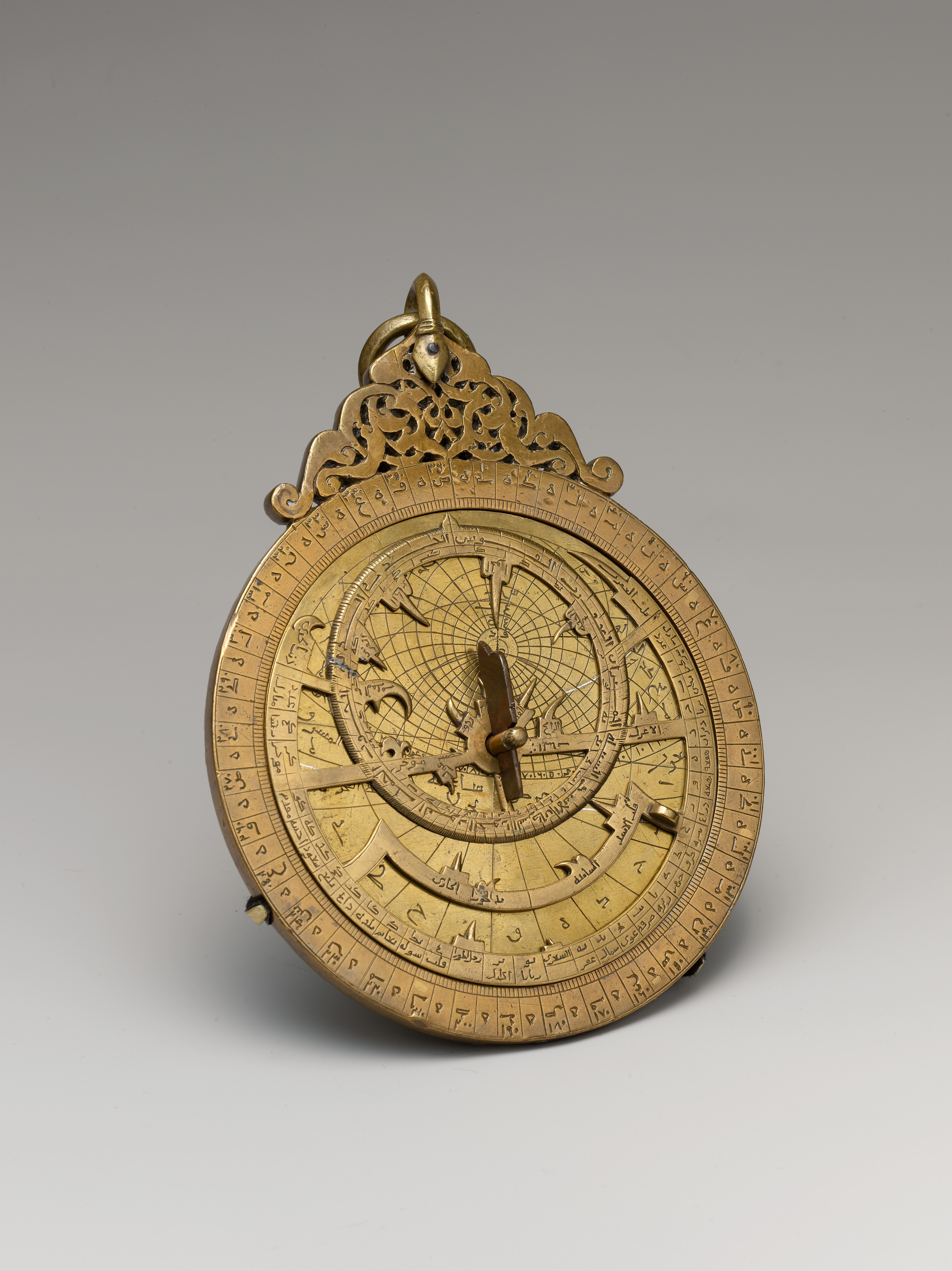 Astrolabe; Metal